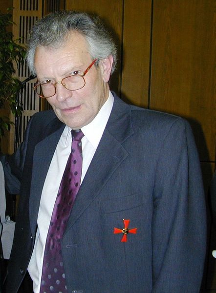 Werner Dörflinger im Jahr 2001